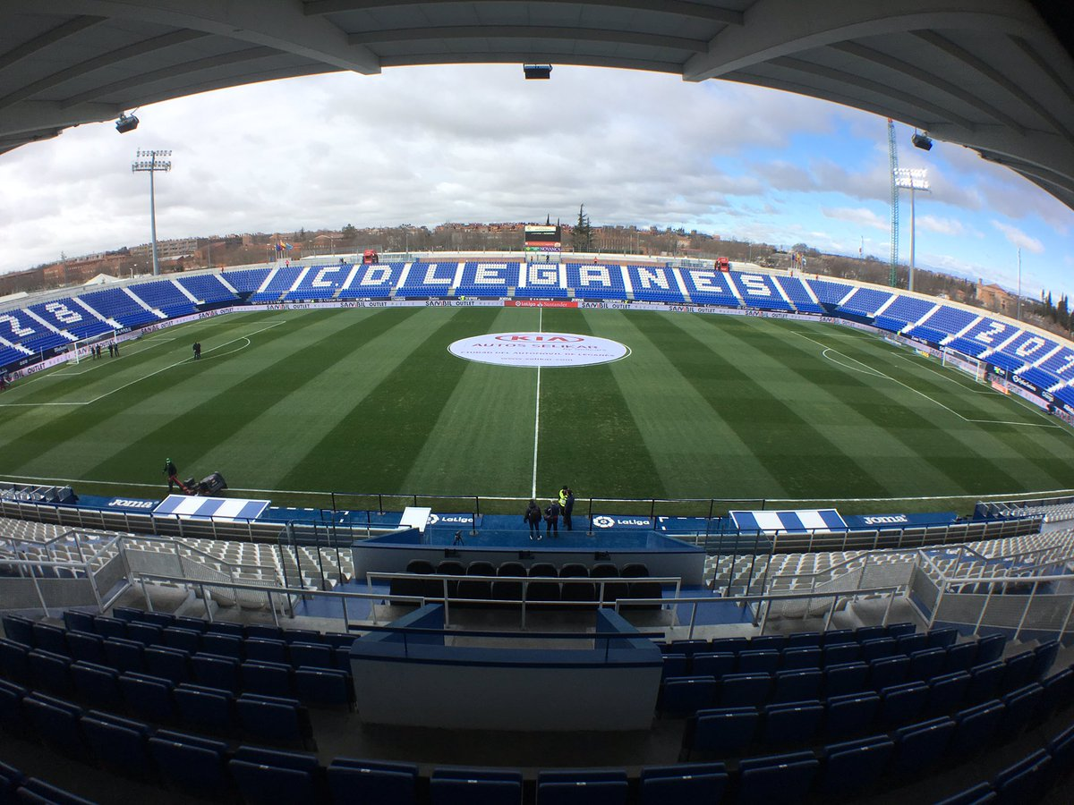 Panorámica del estadio Municipal de Butarque tras la ampliación